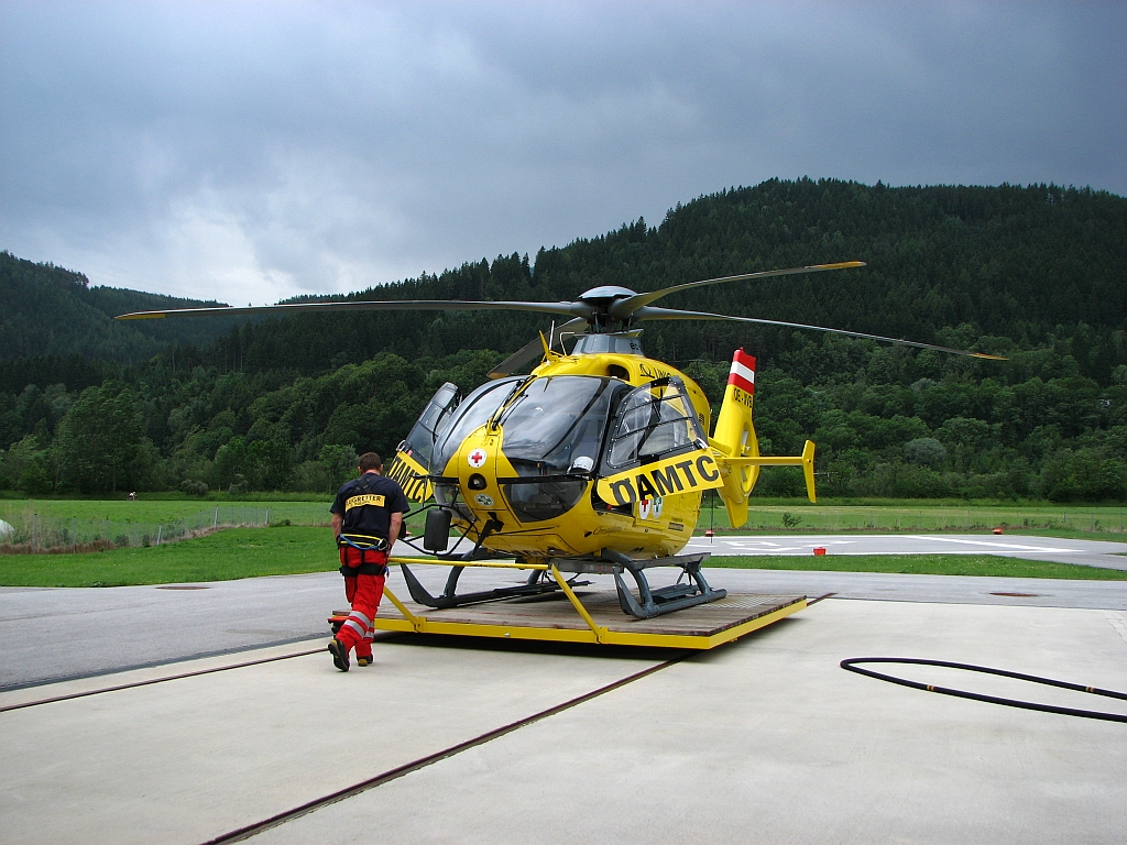 Der Notarzthubschrauber Christophorus 1 ist in Innsbruck stationiert